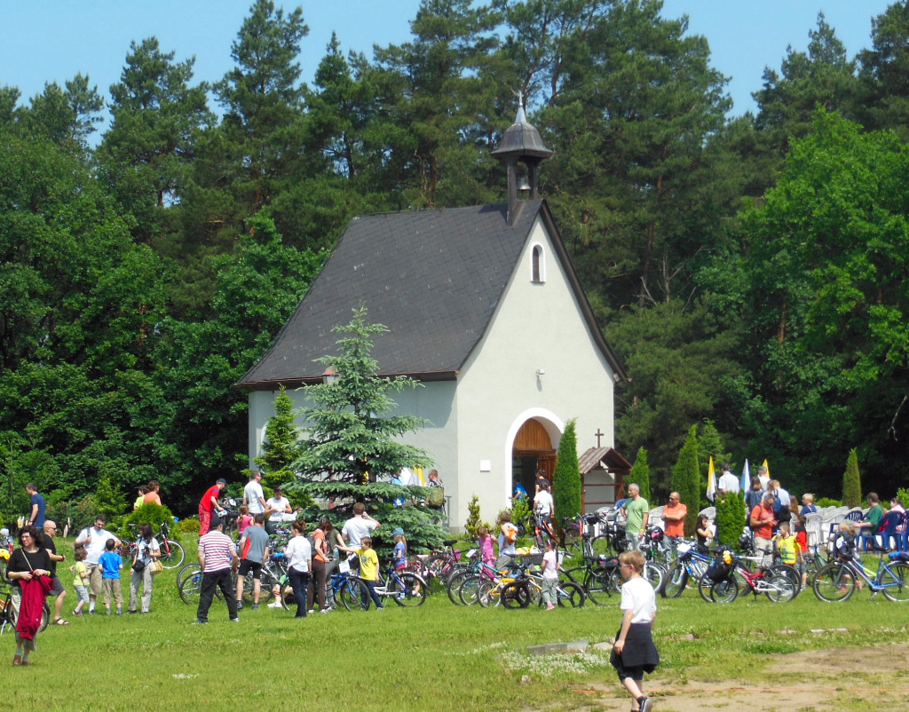 Sanktuarium szensztackie Zawierzenia w Bydgoszczy na osiedlu Piaski